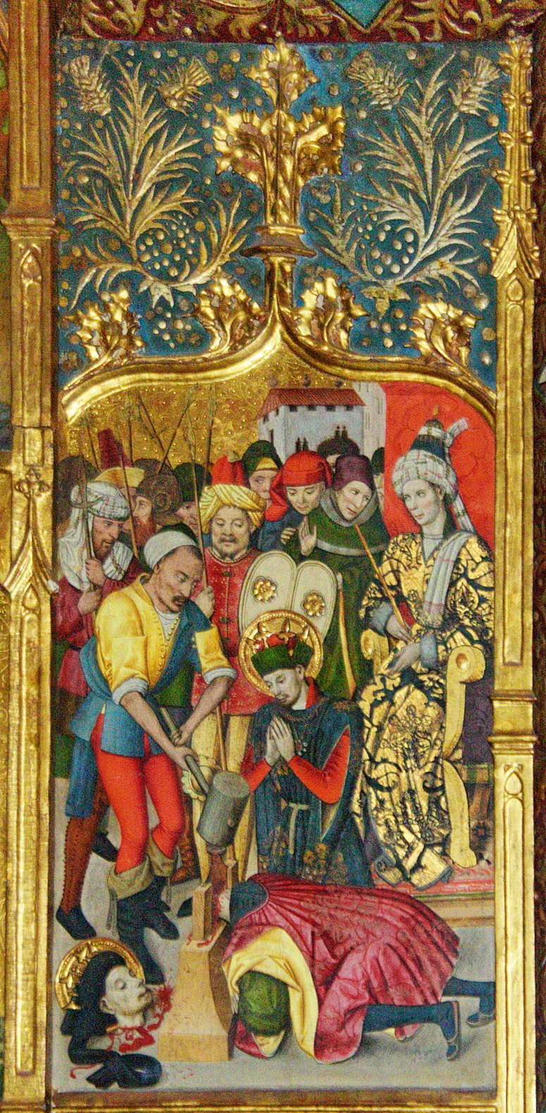 Representa els sants Abdó i Senén i la pradel.la és dedicada als sants metges Cosme i Damià. És una de les poques obres que es poden atribuir amb tota certesa a Jaume Huguet, ja que se'n conserva el contracte de l'any 1460. Huguet és l´únic representant català de la tendència flamenca, que domina el període final del gòtic. A la taula central hi són representants els sants titulars, Abdó i Senén, prínceps de Pèrsia que van ser capturats i morts a Roma. Per causes desconegudes, sembla que les relíquies d'aquests sants van ser traslladades a Arlés del Tec (Vallespir) i d'aquí la rao que gaudissin d'un culte ben arrelat a Catalunya, invocats com a patrons de la pagesia i coneguts com Sant Nin i Sant Non. Composen el reatule un Calvari i quatre escenes relatives als sants. A la pradel.la es descriuen escenes del matitiri i la mort dels sants Cosme i Damià, metges amb un possible origen àrab i, com els anteriors, també molt venerats a Catalunya. Al guardapols, decoracions de tipus vegetals i les armes de Terrassa i Barcelona. Actualment es troba a l'Església de Sant Pere de Terrassa.